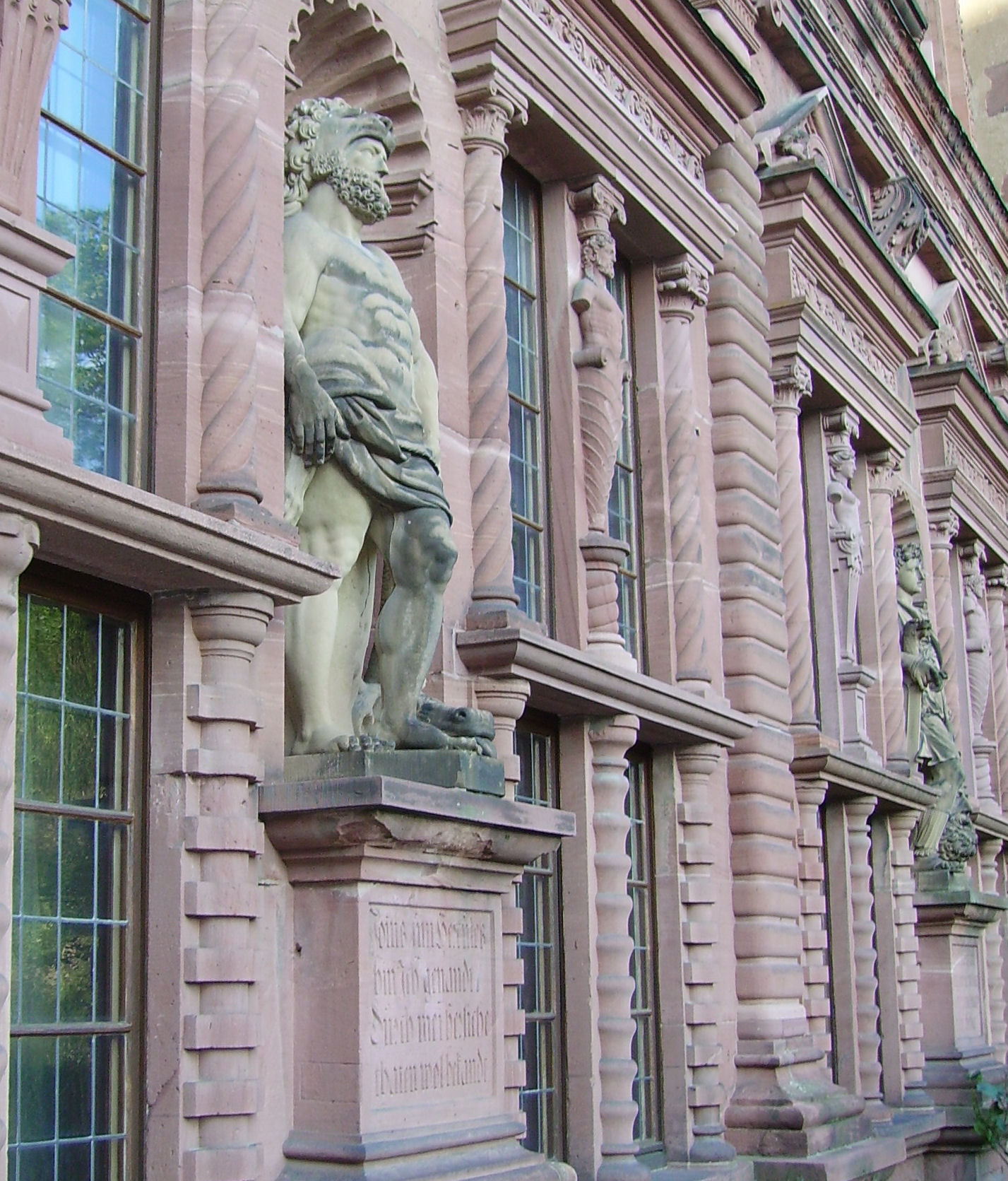 view of Heidelberg Castle